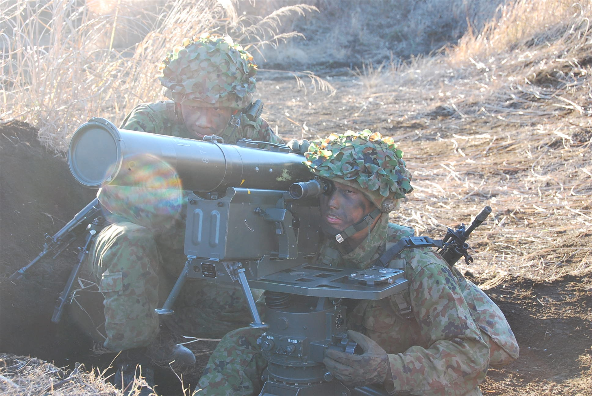 Title ８７式対戦車誘導弾及び発射装置 24.12.11 １Ｄ・第３次師団訓練検閲（32i・戦闘予行）.JPG Album 装備 87式対戦車誘導弾及び発射装置（訓練検閲・第32普通科連隊）